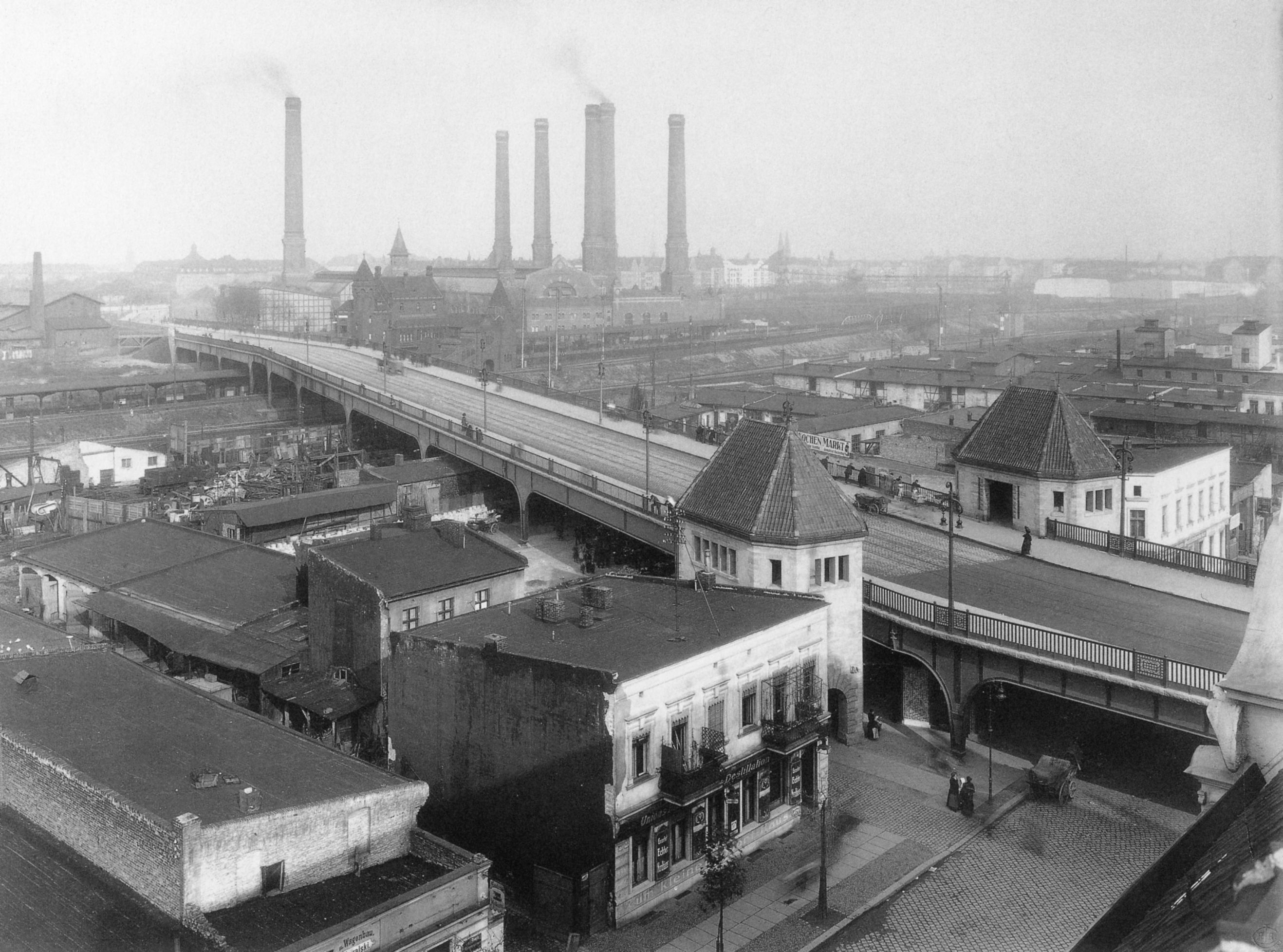 Putlitzbrücke über Quitzowstraße, Güterbahnhof Moabit, Hamburger Bahn, Lehrter Bahn und Ringbahn in Berlin